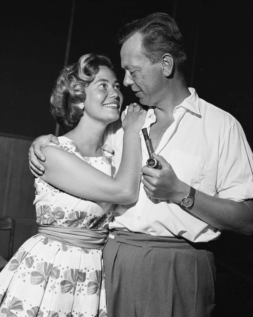 Skuespillerparet Frimann Falck Clausen (1921–1983) og Anne Lise Tangstad (1935–1981).